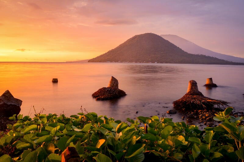 foto ini adalah pulau maitara dan gunung gamalama yang di ambil di kepulauan tidore. ternante dan tidore merupakan surga rempah rempah yang termasyur di eropa sehingga bangsa eropa datang mencari rempah rempah di indonesia. selain itu pesona alam ternate dan tidore sangat indah, walaupun seiring jalan banyak perusakan yang di lakukan manusia.